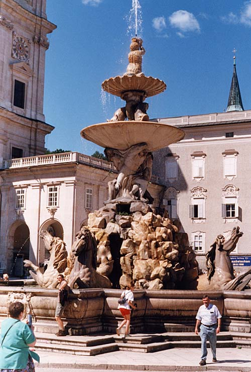 Fountain in the Residenzplatz, Salzburg, Austria.